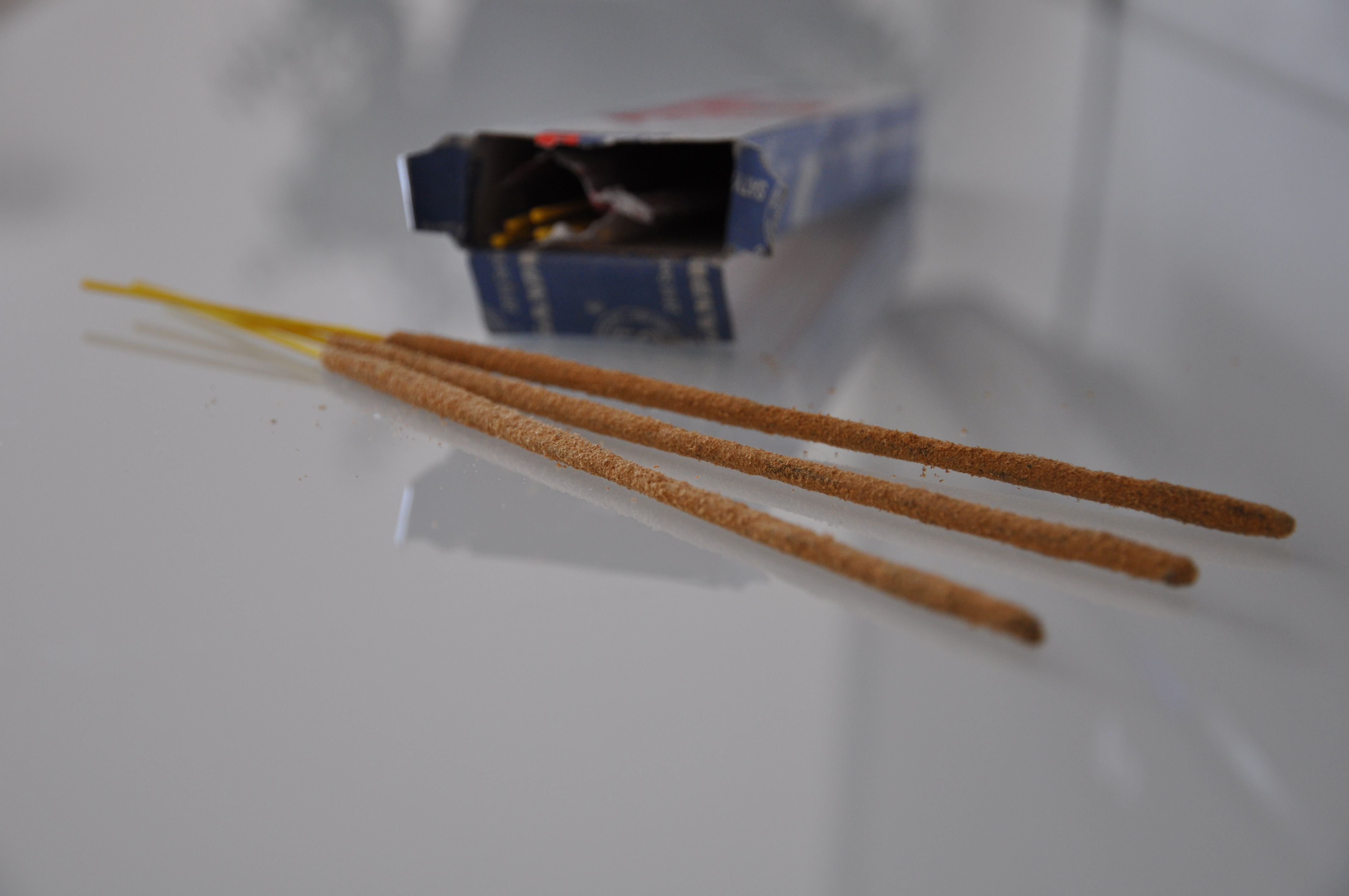 Wierookstokjes.